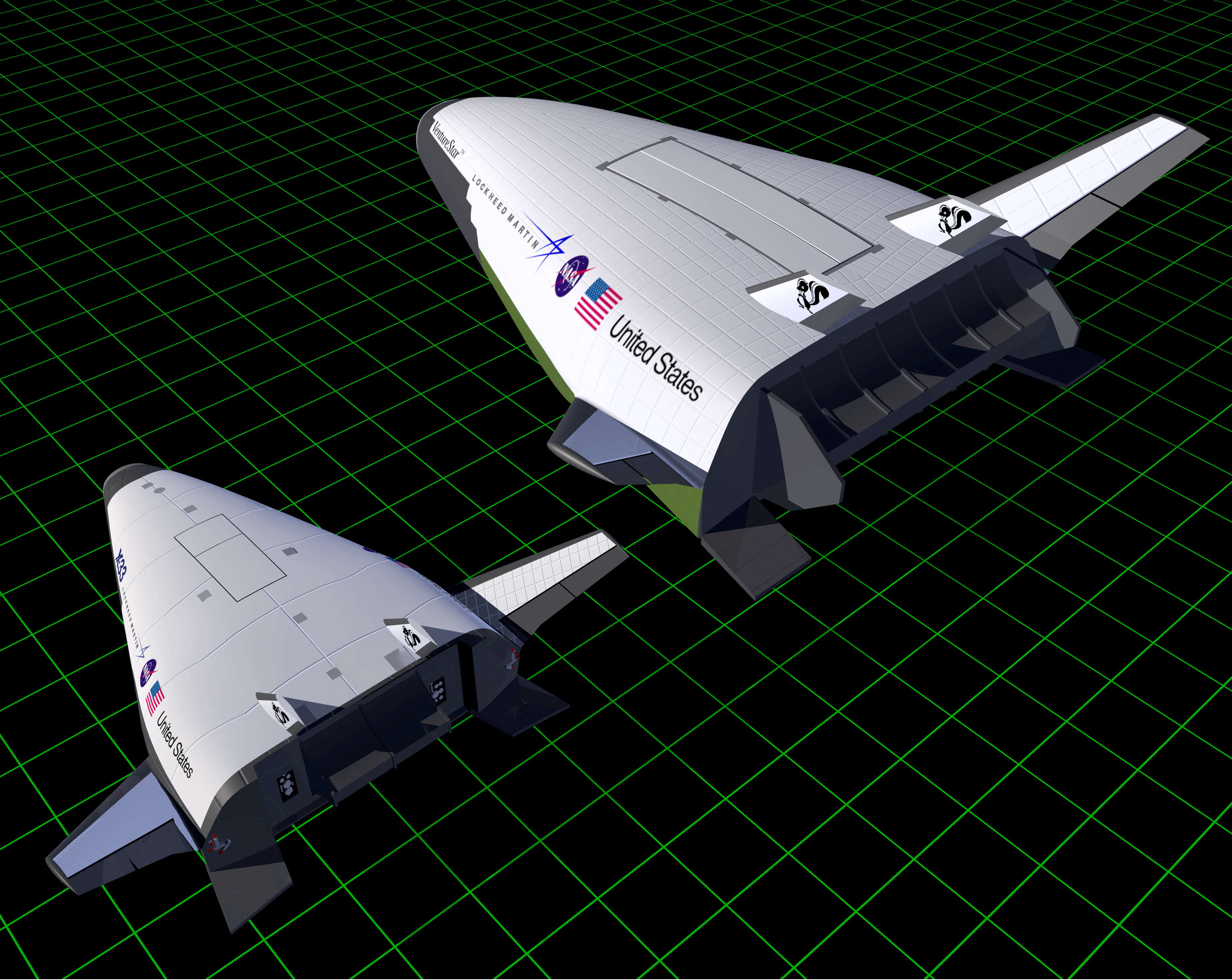 X-33 versus Venture Star